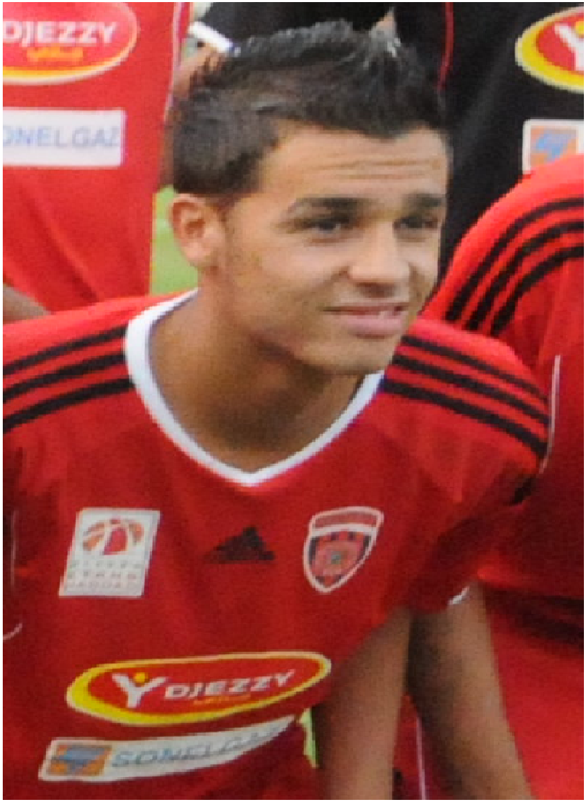 farouk Chafai défenseur USMien